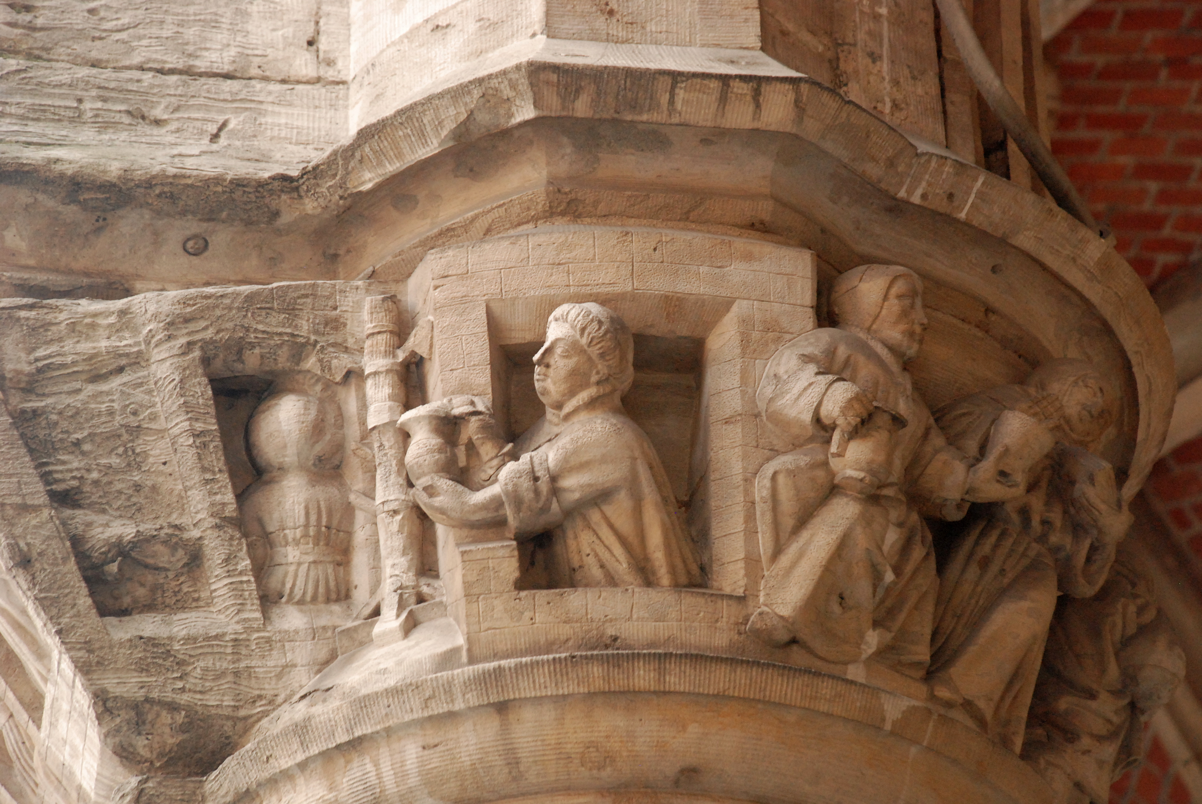 Belgique - Bruxelles - Grand-Place - Hôtel de ville - Cellier des Moines